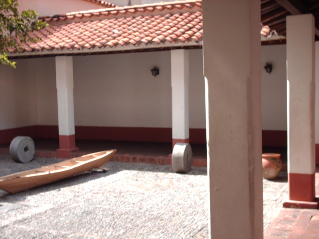 Caballeriza de la casa natal del Libertador.